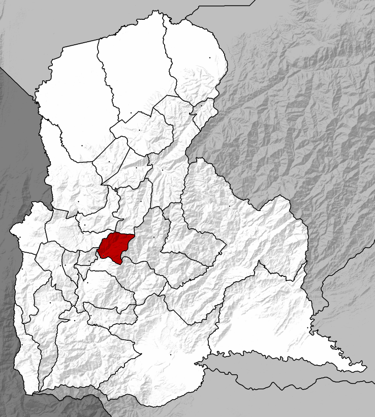 Mapa localizador con relieve del municipio Andres Bello del estado Táchira